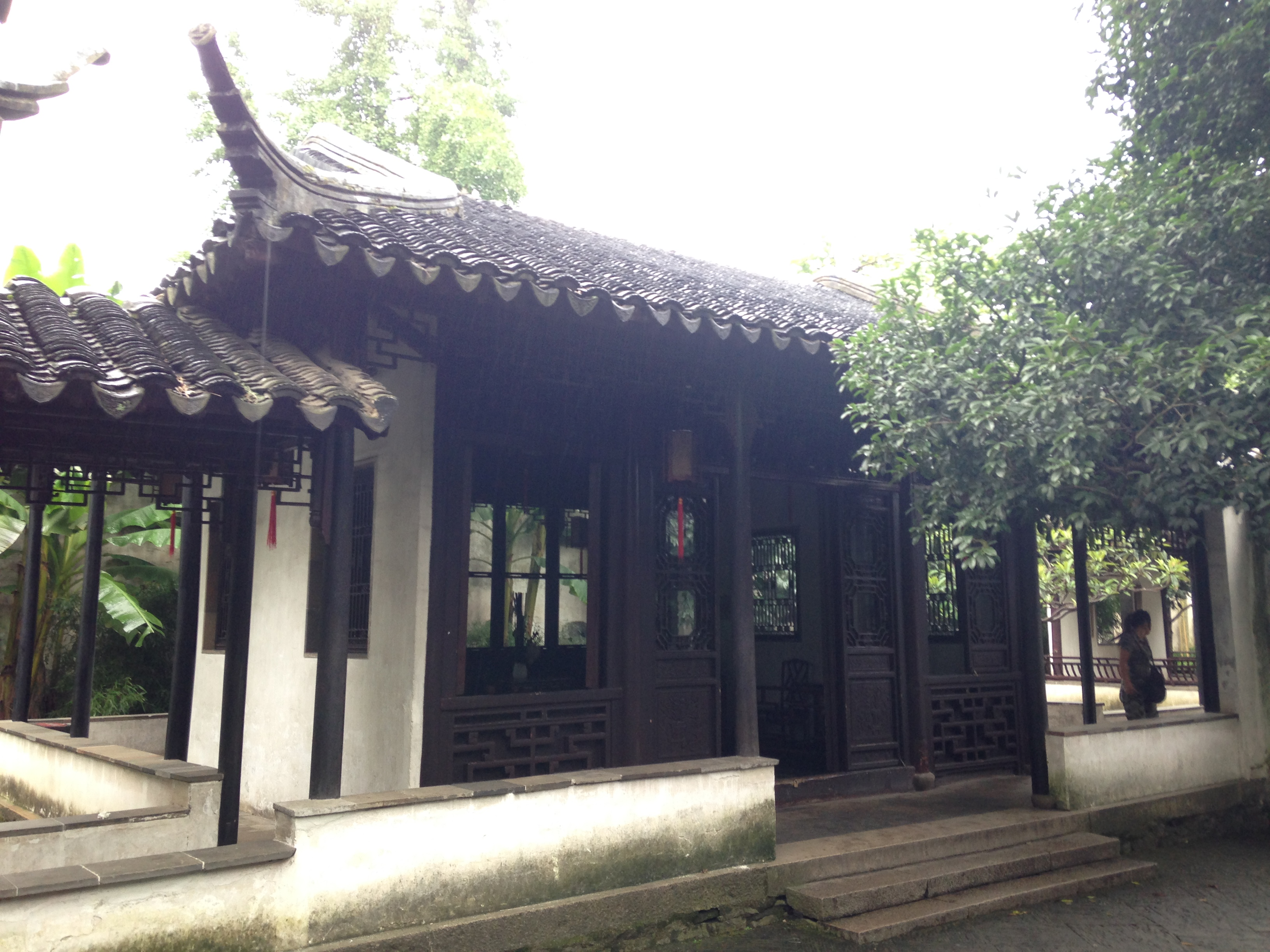 拙政園・聴雨軒